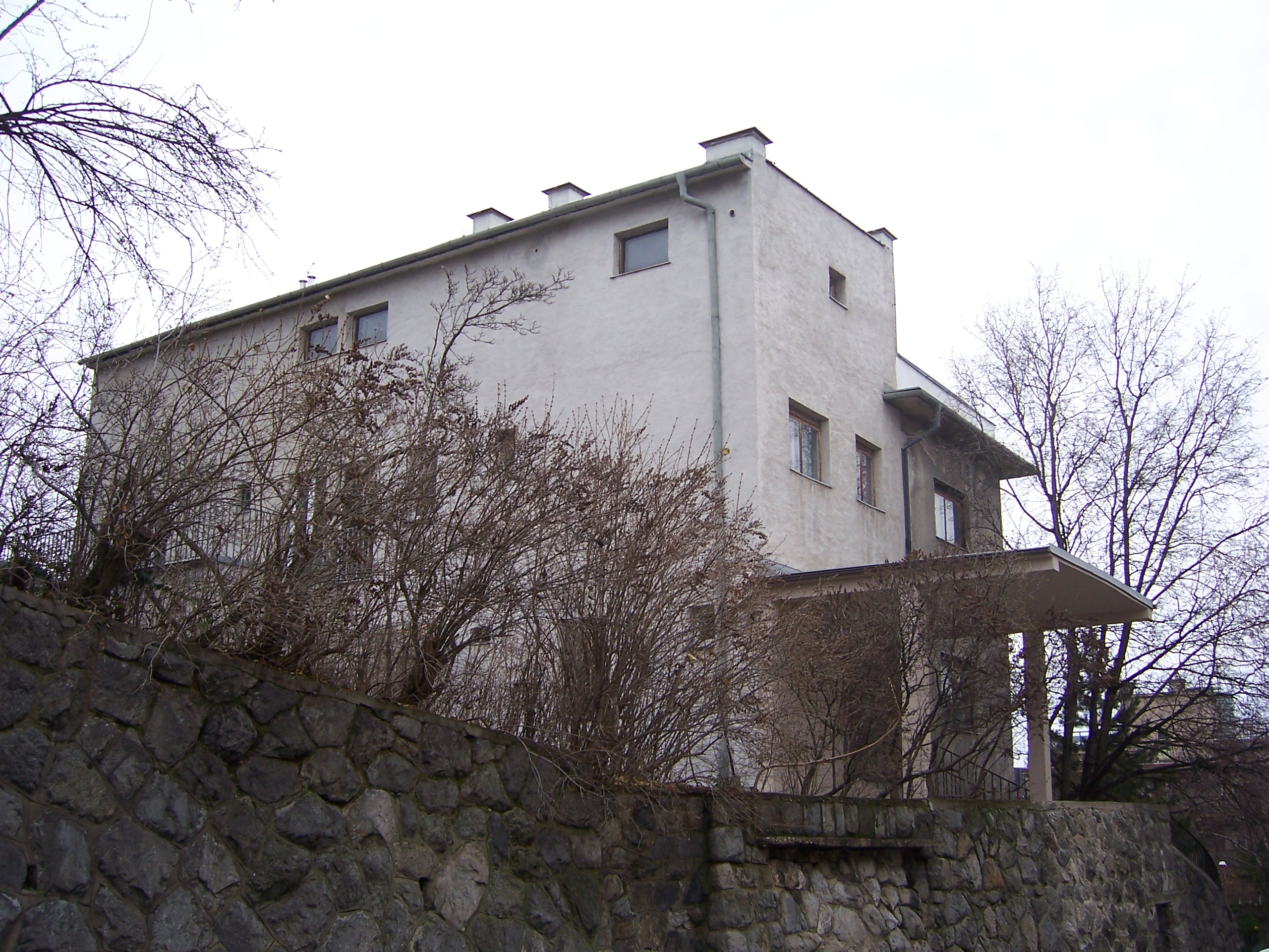 Vila L.